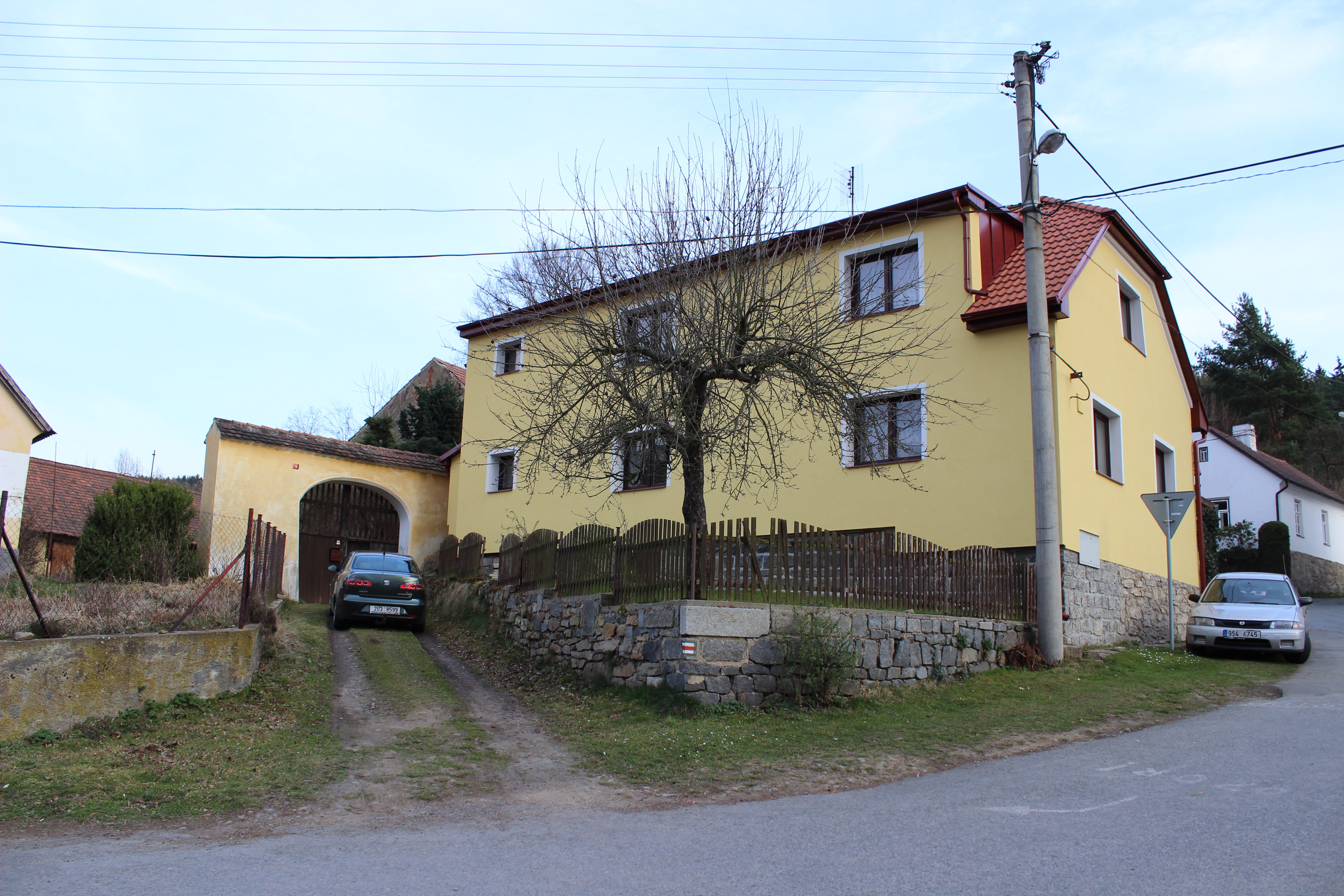 Dům číslo popisné 26 spolu s bránou v Křečovicích. This photograph was taken with a Canon EOS 600D